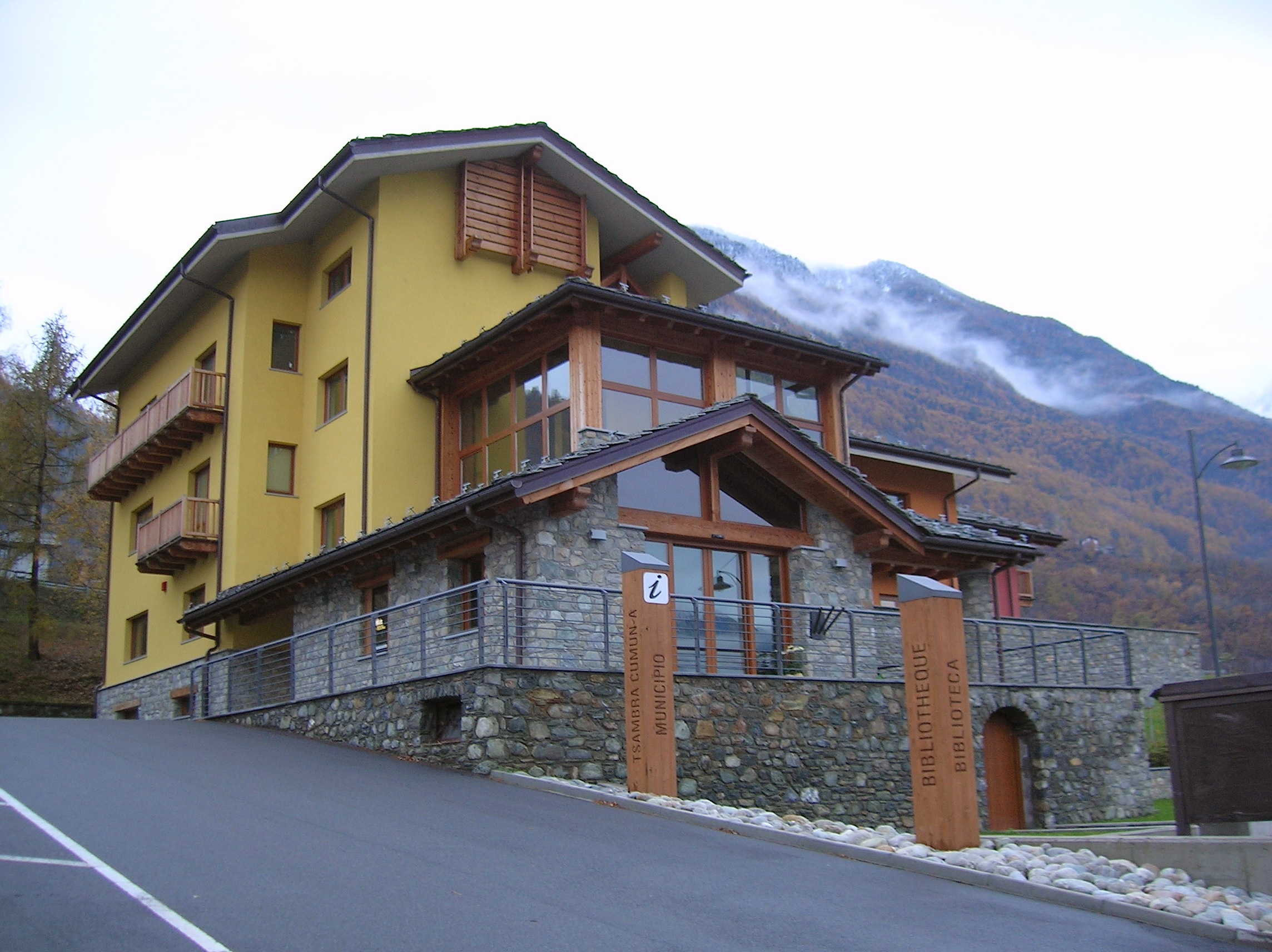 Municipio e biblioteca di Saint-Marcel, Valle d'Aosta, Italia.